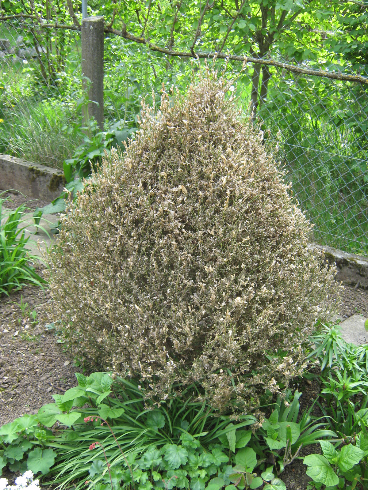 Buchsbaumbusch nach Befall durch Buchsbaumzünsler